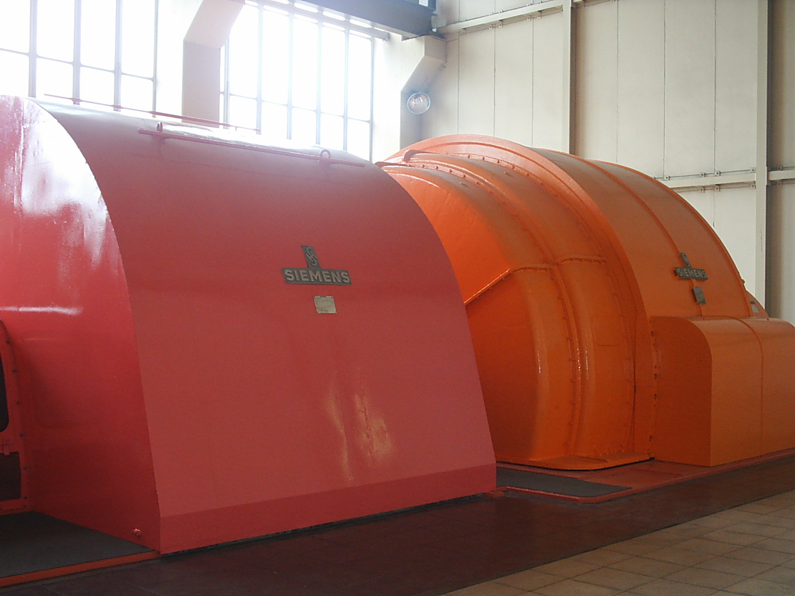 Das Bild zeigt die Maschine E2 im Umformerwerk Karlsruhe. Links befindet sich der Motor, rechts der Generator. Die Leistung beträgt etwa 25 MW andere Versionen: Bild:Umformer_E1_KA_Generatorlaeufer.jpg, :bild:Umformer_E1_KA_Generator+laeufer.jpg, :bild:Umformer_E1_KA_Motor.jpg, :bild:Umformer_E1_KA_Motor-nah.jpg